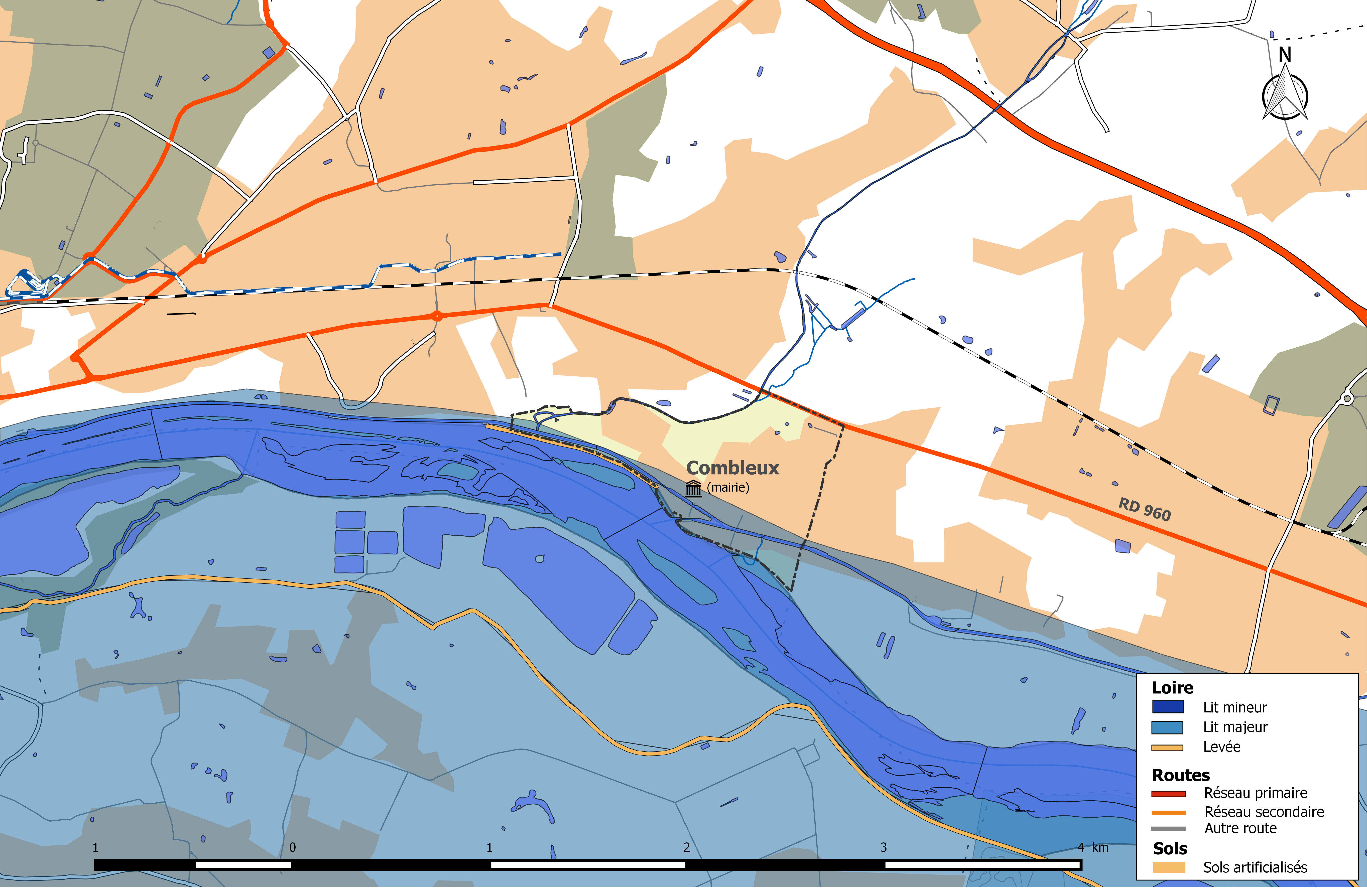 Zone inondable et réseaux hydrographique et routier de la commune de Combleux.